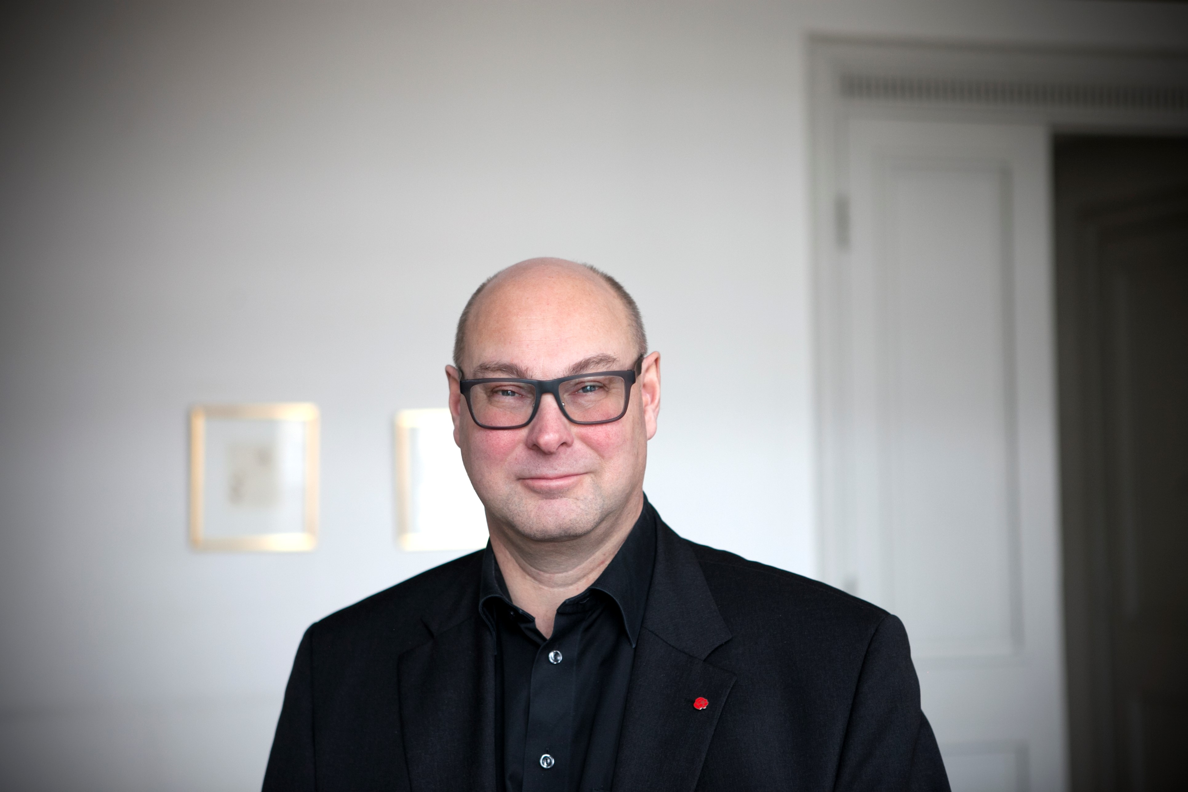 Jörgen Hellman riksdagsledamot (S) i riksdagens lokaler.